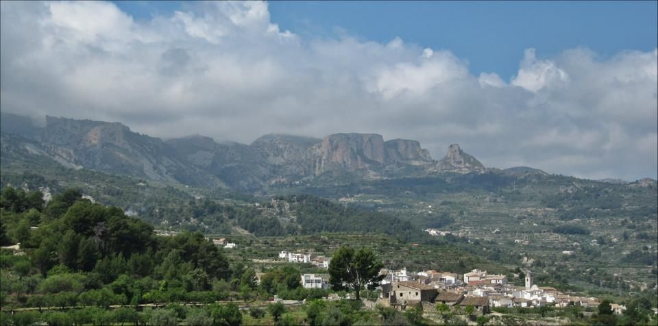 Vista de los pueblos del Valle de Guadalest y Aitana.